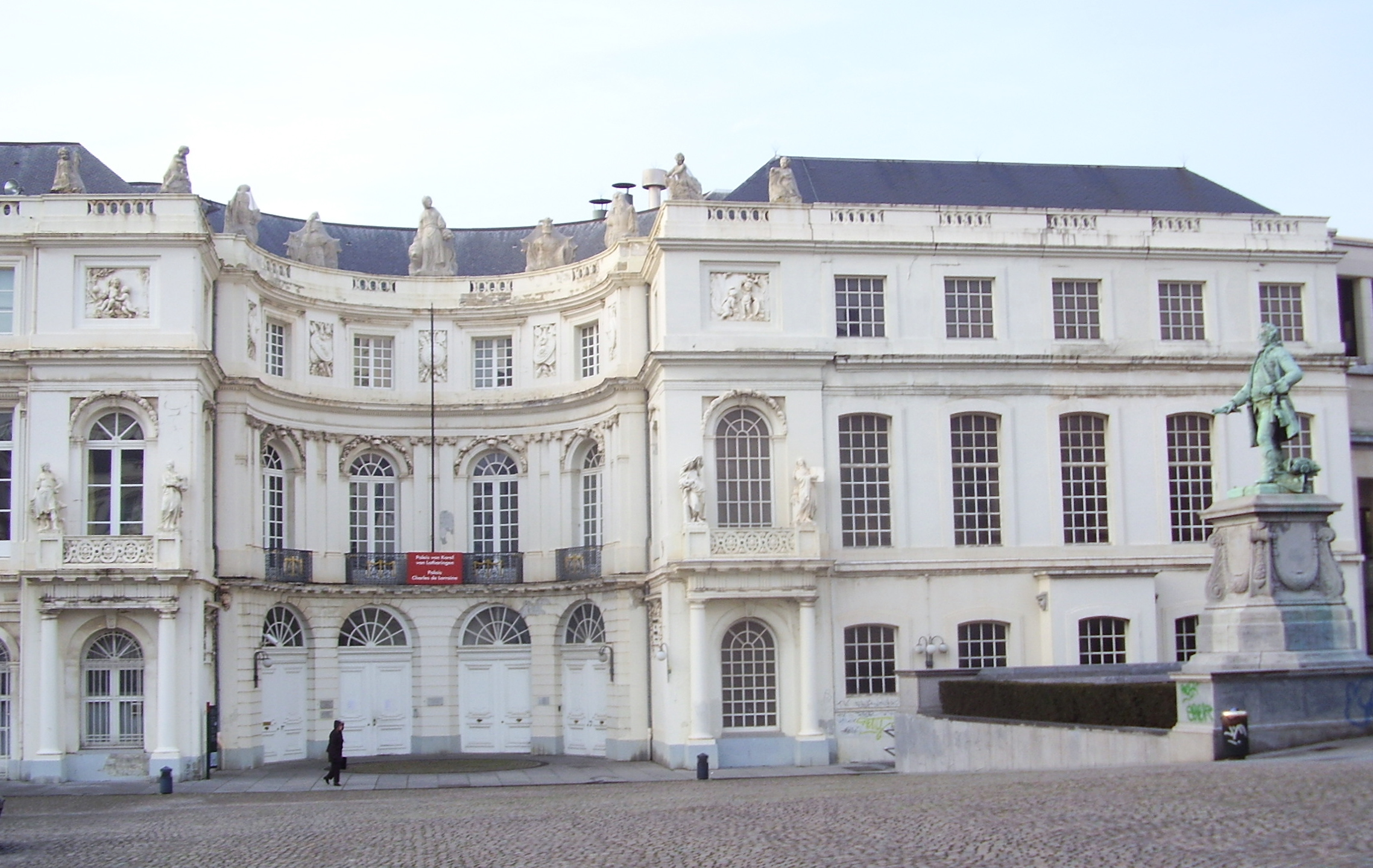 Église protestante de Bruxelles, place du Musée - Belgique